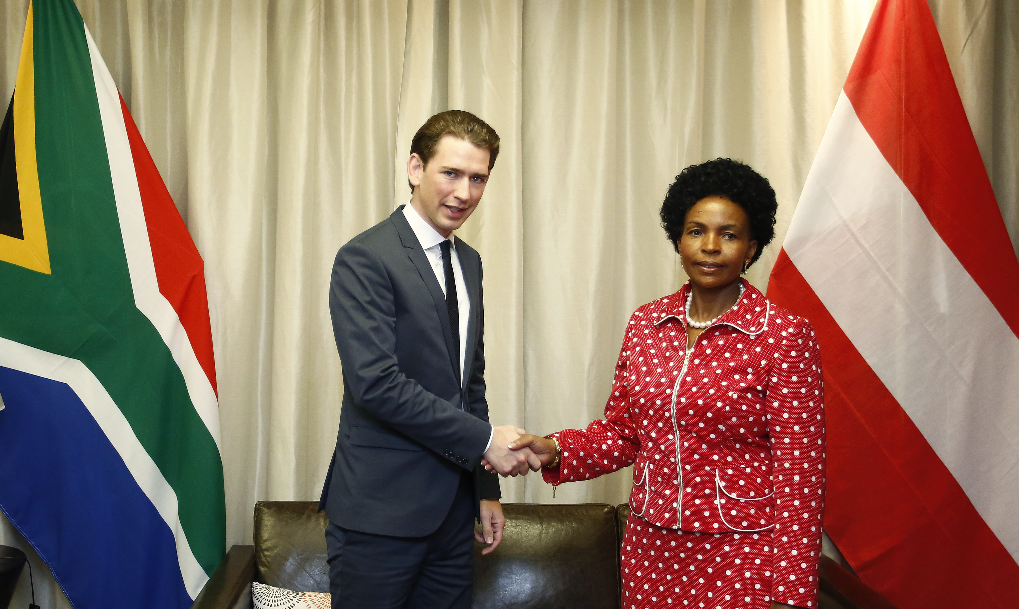 Arbeitsbesuch Südafrika. Bundesminister Sebastian Kurz trifft die südafrikanische AuÃenministerin, Maite Nkoana-Mashabane. Pretoria, 24.10.2016, Foto: Dragan Tatic